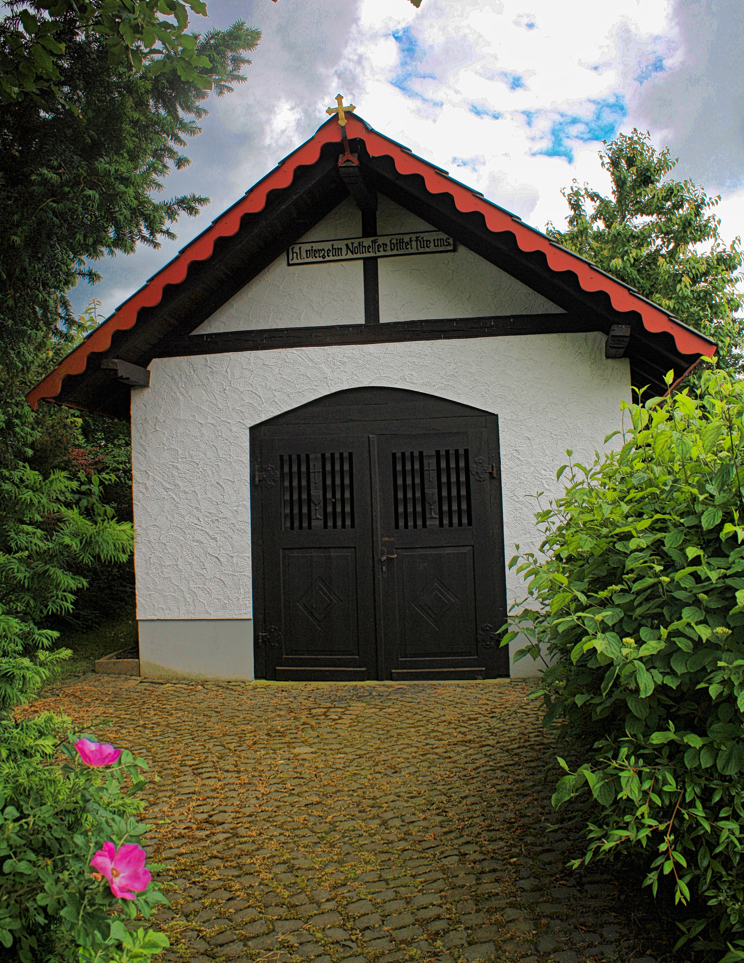 Kapelle der 14 Nothelfer bei Honerath